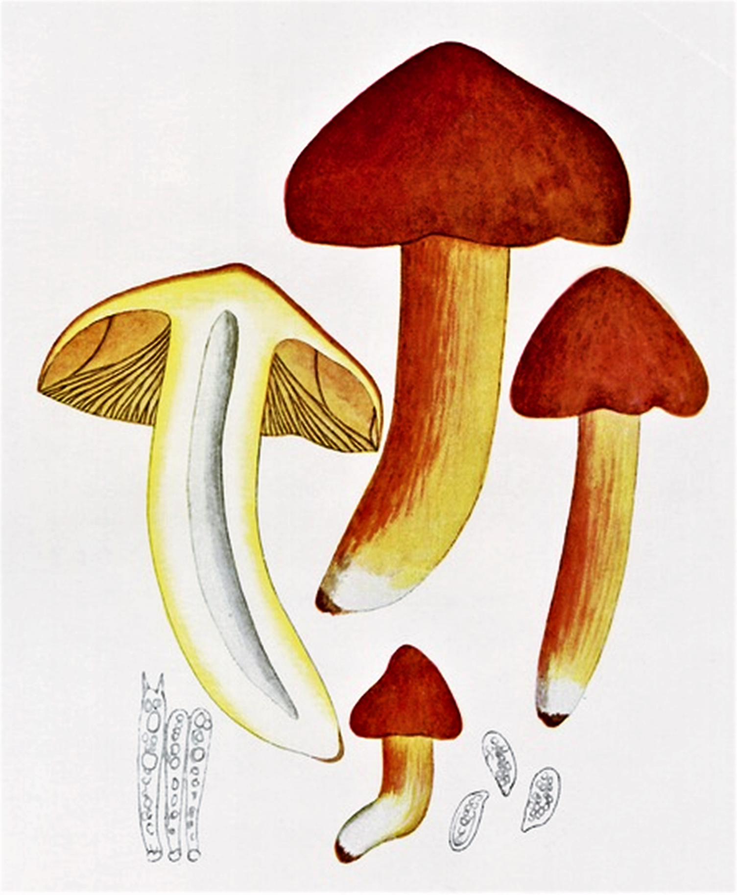 Giacomo Bresadola: Hygrophorus puniceus Fr. (1838), heute Hygrocybe punicea (Fr.) P.Kumm. (1871)